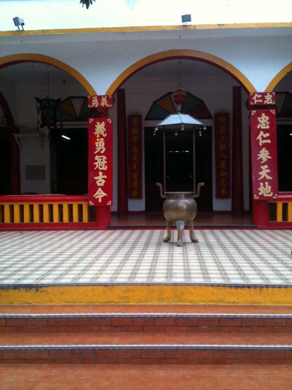 Brule encens